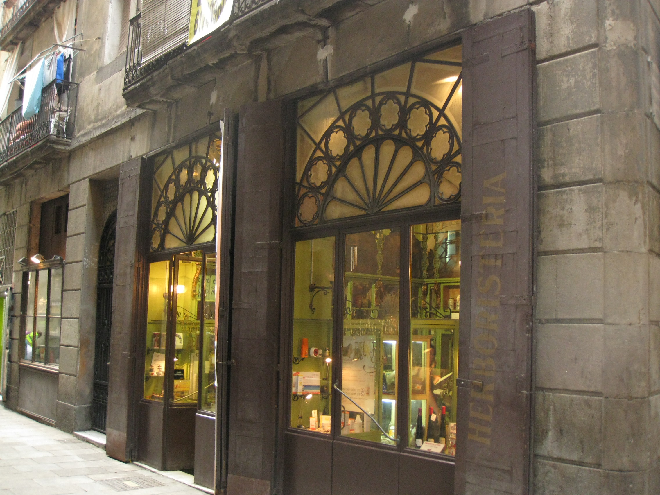 Herboristeria del Rei (1858), la botiga d'herbes més antiga de Barcelona, al barri Gòtic. La va decorar el pintor i escenògraf Francesc Soler i Rovirosa. Dóna als carrers del Vidre (a la imatge) i de les Heures, tocant a la plaça Reial.